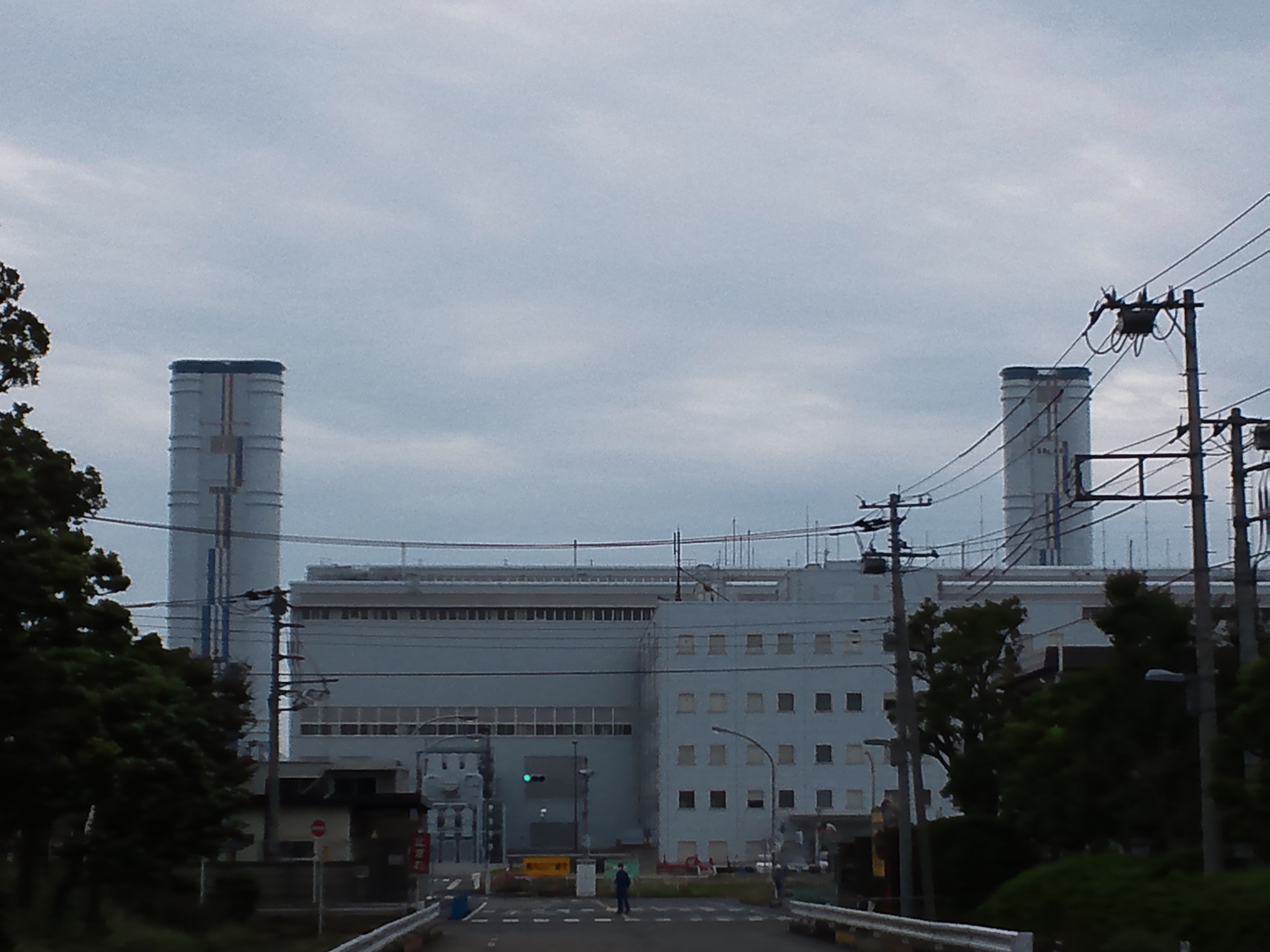 東京電力川崎火力発電所